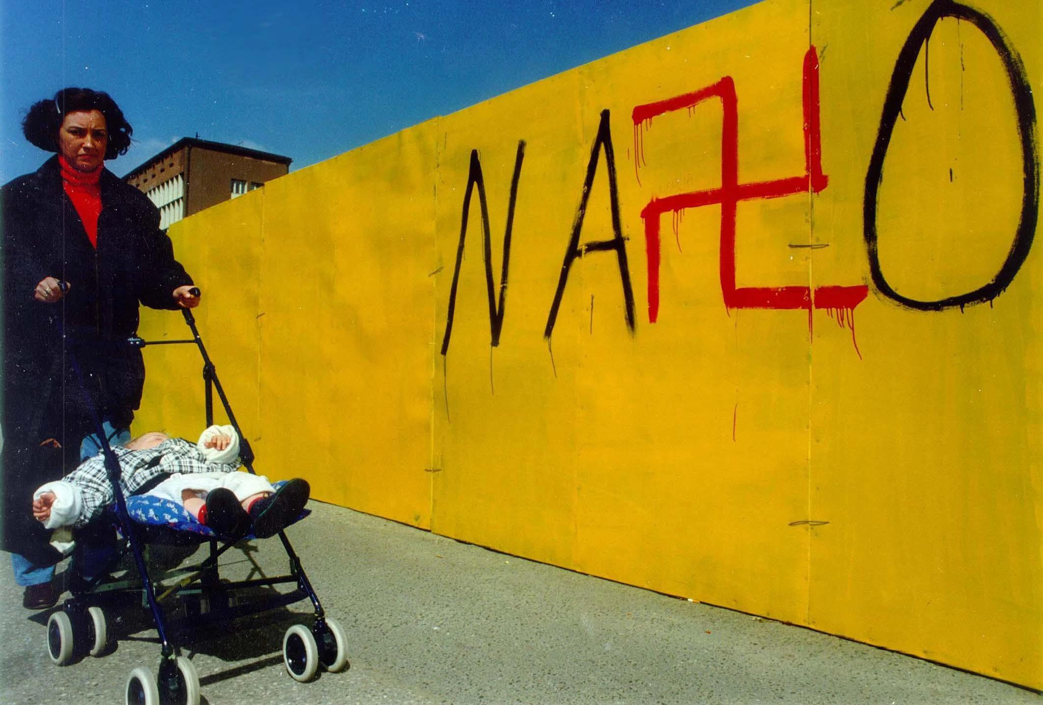 Нато бомбардовање СР Југославија 1999. године. Графити на новосадским улицама током Нато бомбардовања СР Југославија.